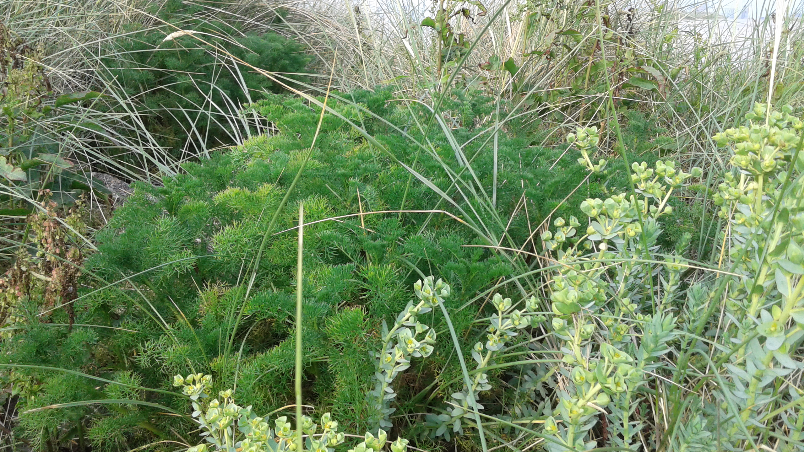 photo 2016 lieu digue de break 59210